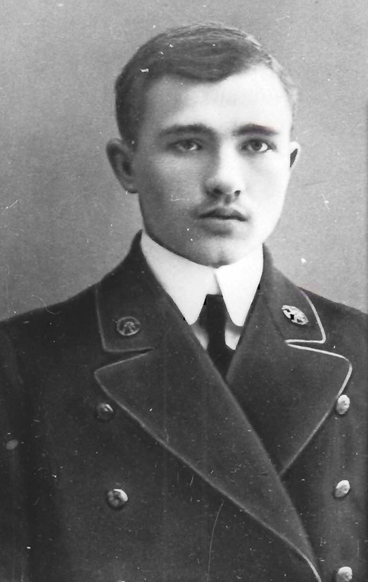 Беларуская (тарашкевіца): Максім Гарэцкі ў 1913 годзе